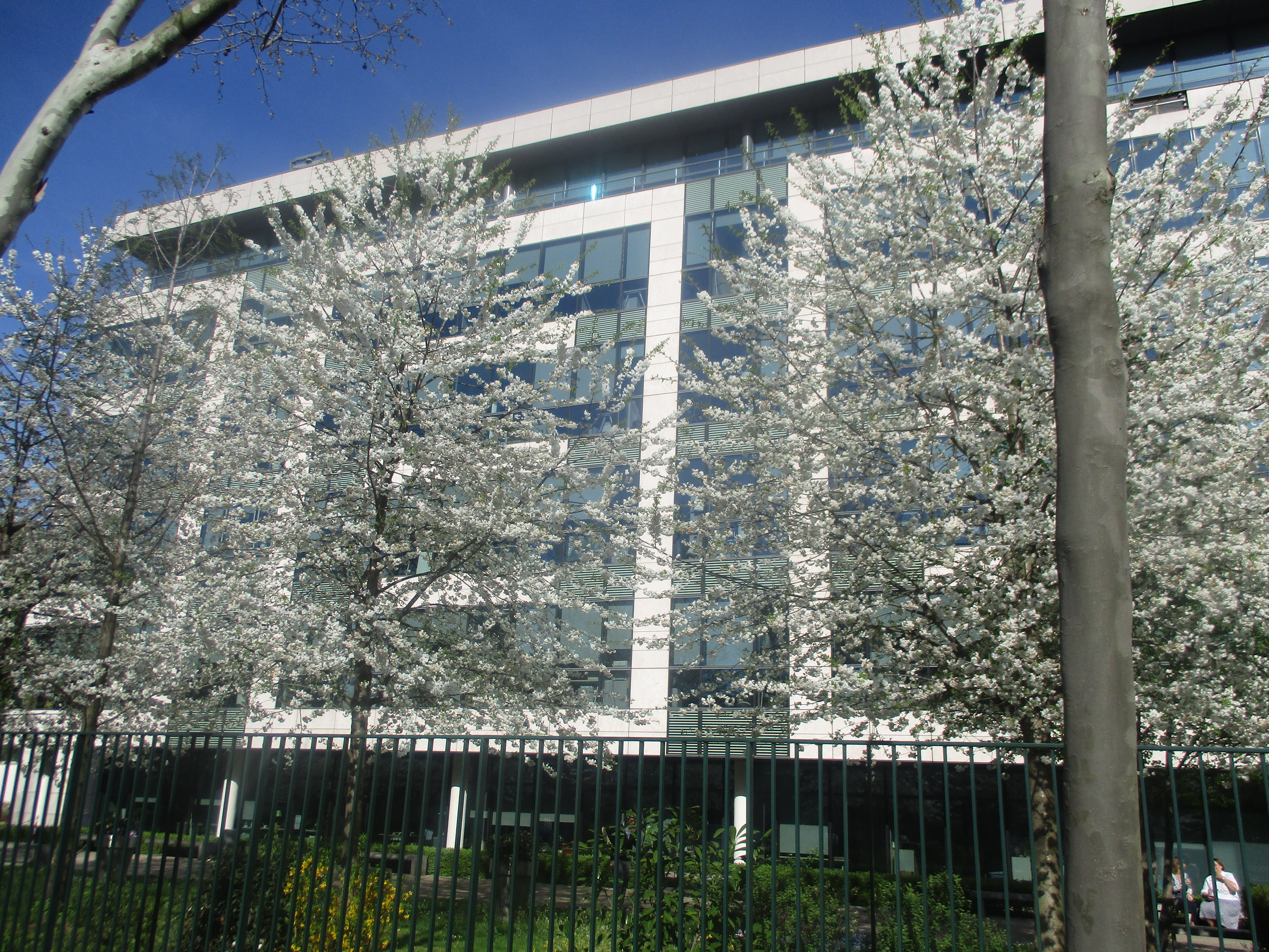 Neuilly, boulevard du Châteauː immeuble du Bureau Veritas. Aujourd'hui annexe de la DGSI.